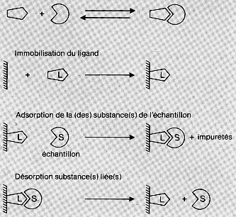 couplage du ligand, adsorption, desorption.